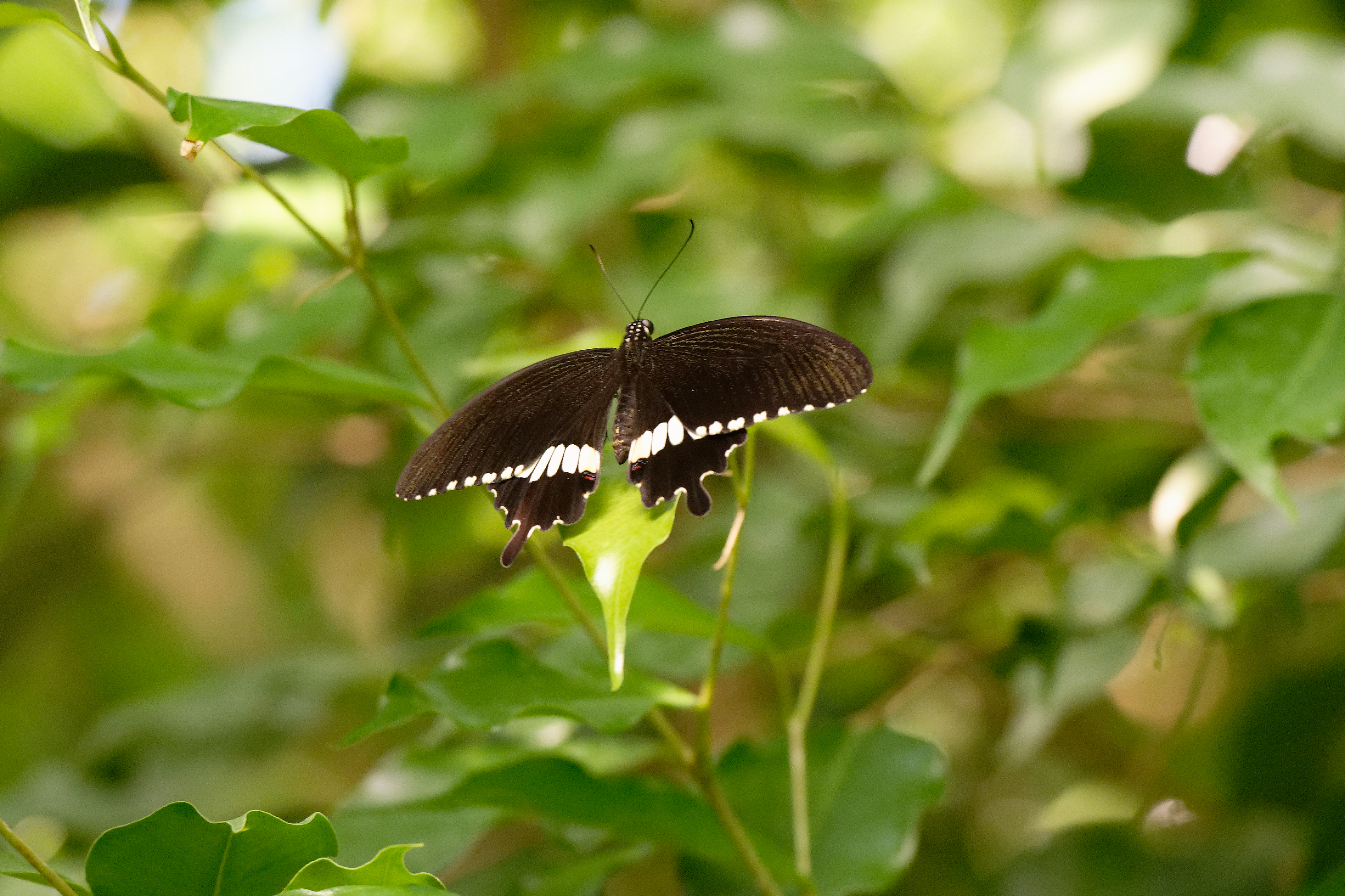 Papilio polytes, gewöhnlicher Mormonenfalgter